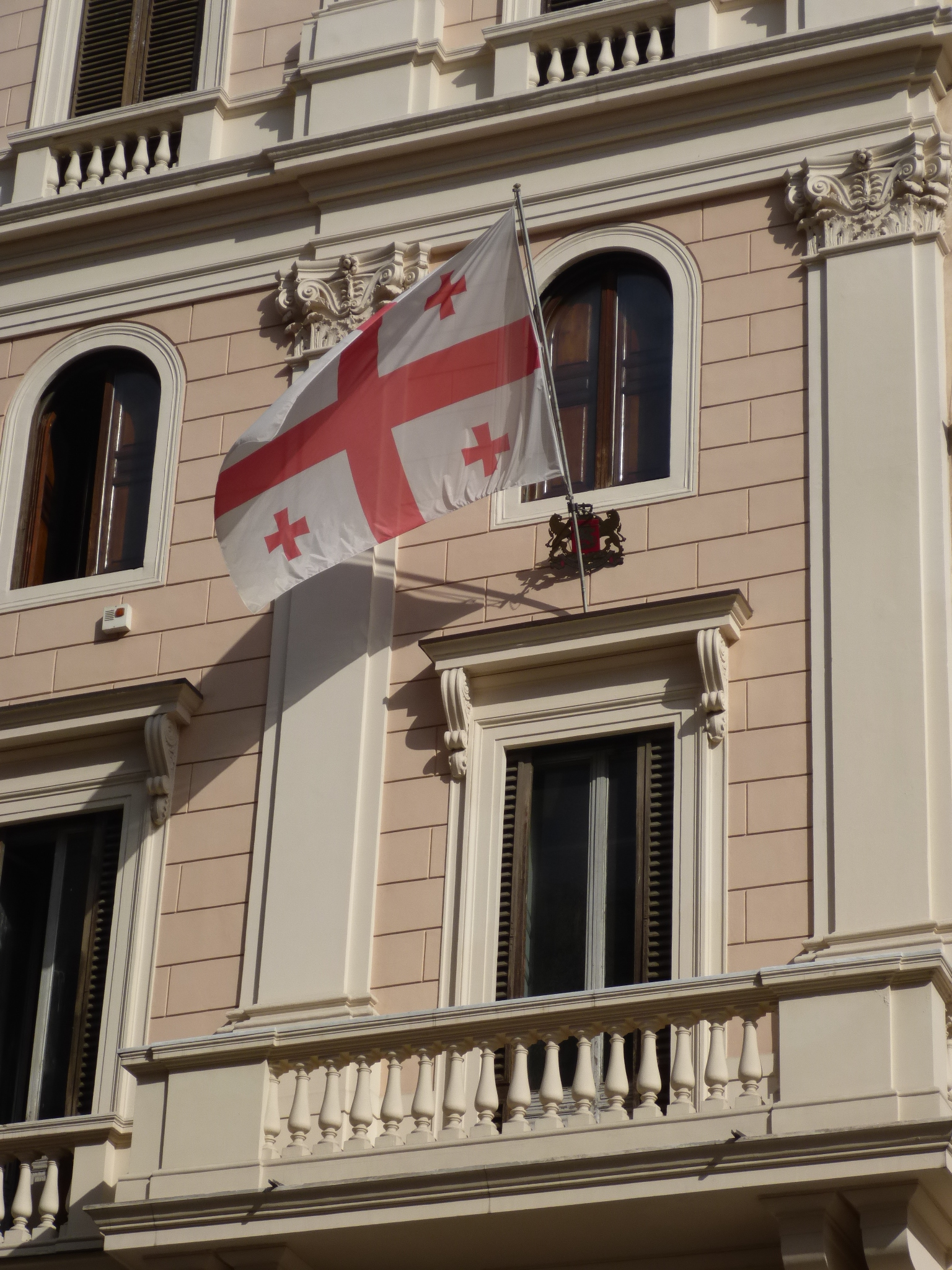 Roma, bandiera della Georgia alla sede dell'ambasciata, (corso Vittorio Emanuele 21).